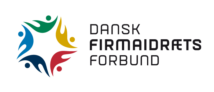 Nyt logo for Dansk Firmaidrætsforbund